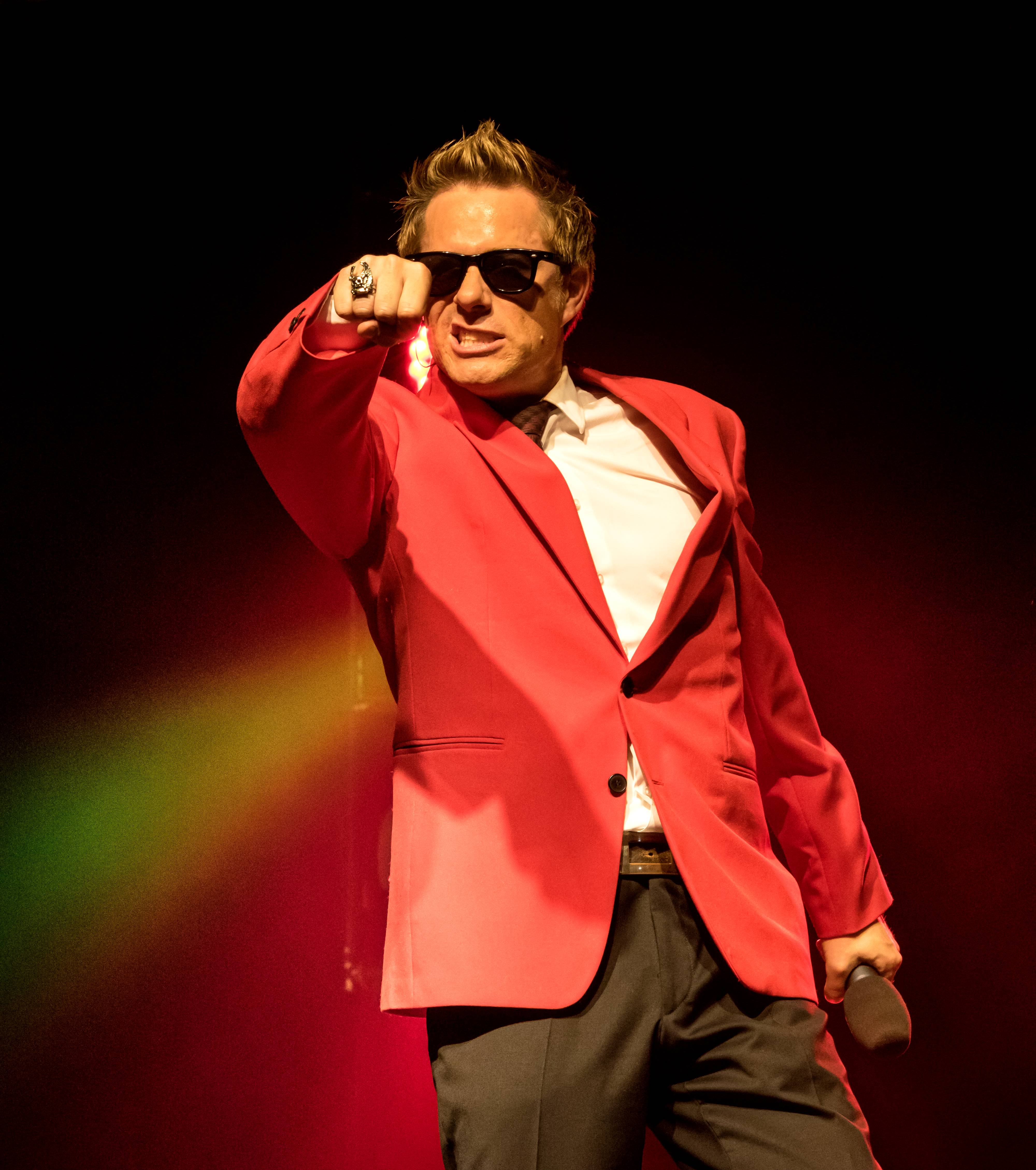 Bilder vom ZMF 2015,die Gala FORK am 15. Juli 2015